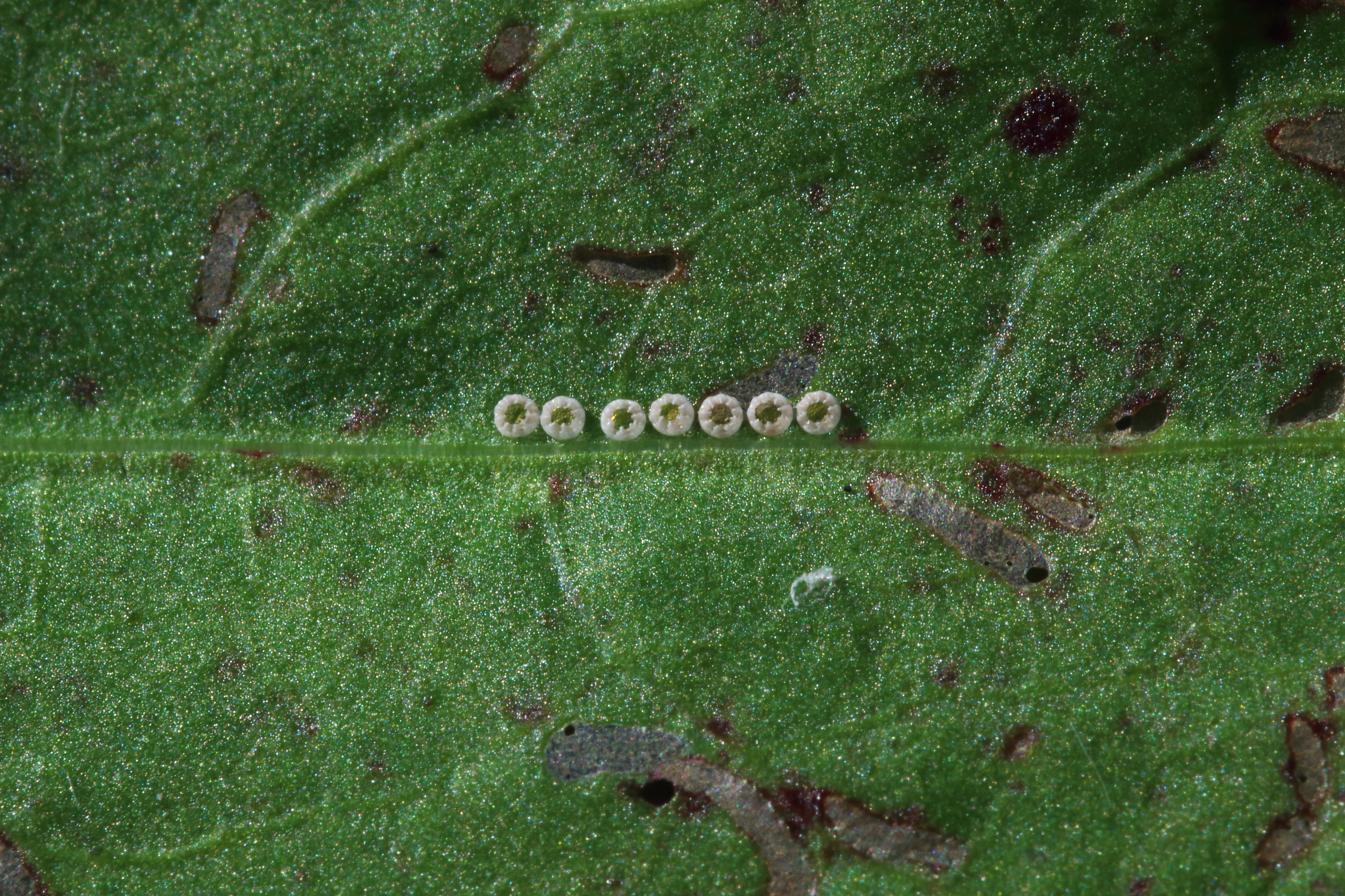 Eier des Großen Feuerfalters in der Nähe von Schutterwald in der Offenburger Rheinebene. Meißt legt das Weibchen nur ein Ei, selten auch mehrere.